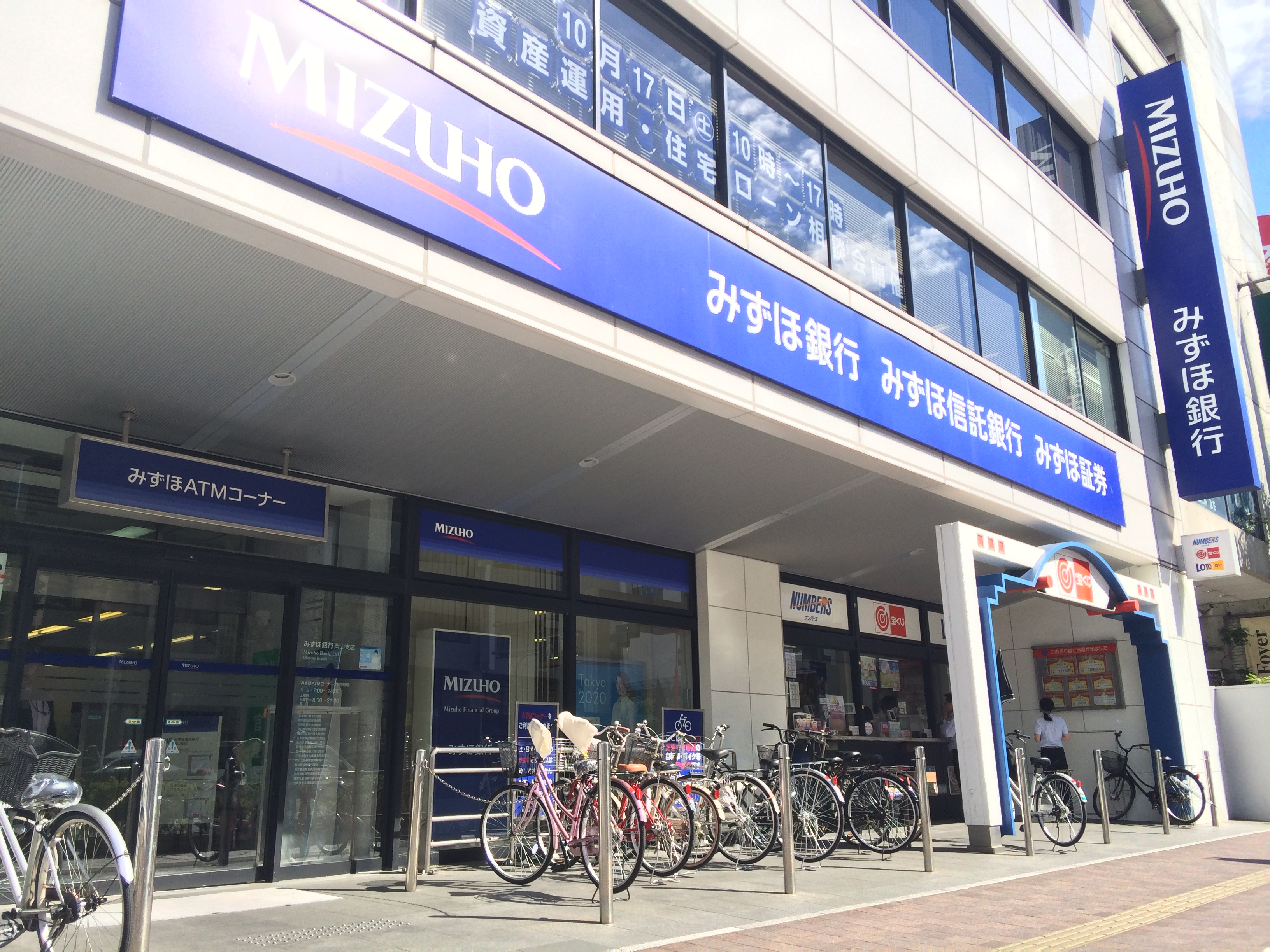 岡山県岡山市北区錦町1番1号 岡山駅前ビル101にあるみずほ銀行岡山支店。